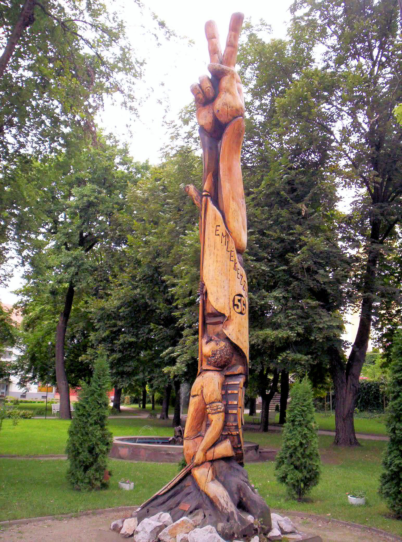 Az 1956-os forradalom és szabadságharc emlékműve Mélykúton. Pálosi Mihály népi fafaragó alkotása. A forradalom 40. évfordulójára állíttatta Nagy János. – photo taken by uploader User:Csanády in 2006. Monument of the 1956 Revolution. Made by Mihály Pálosi.